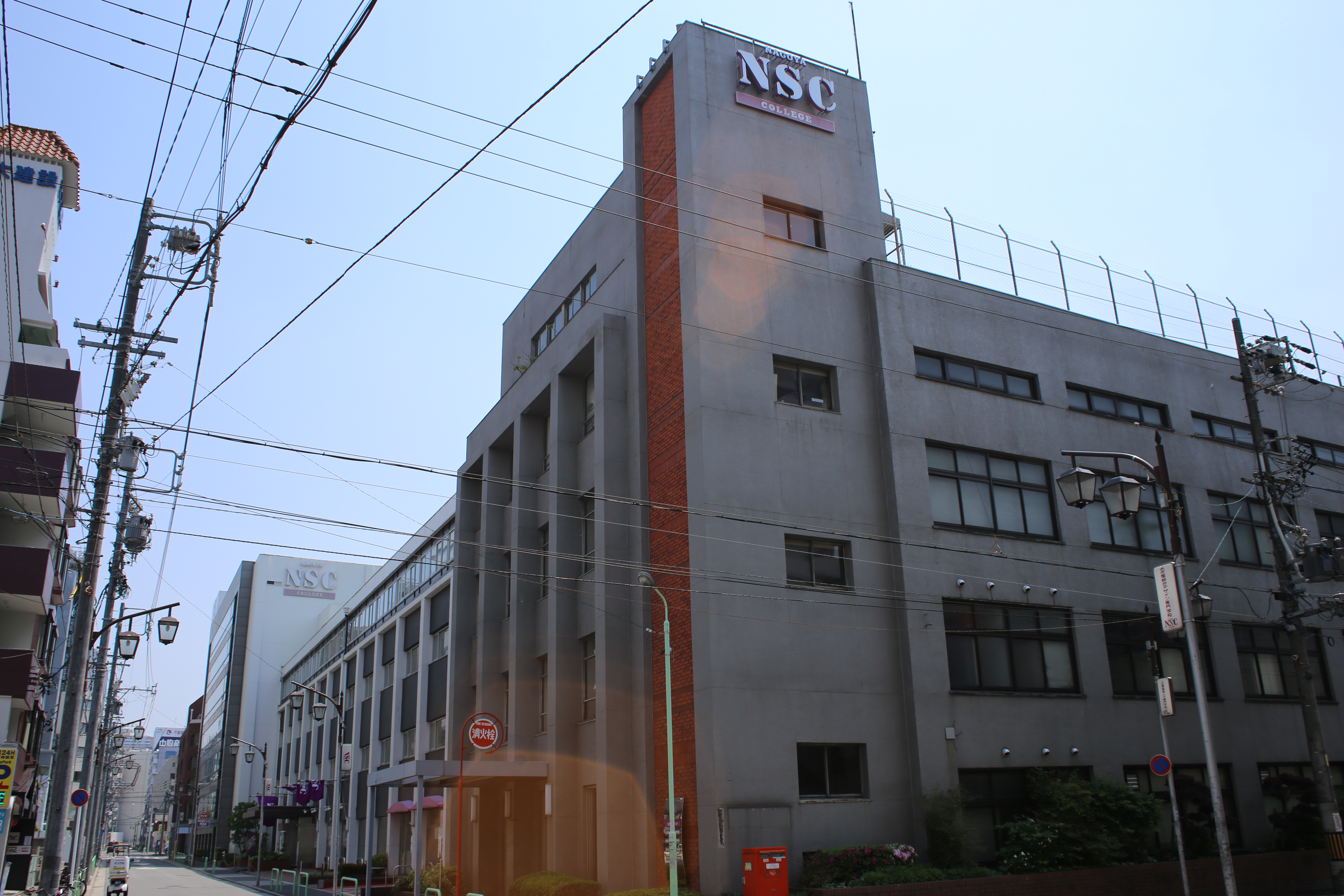 名古屋市中区新栄一丁目の名古屋NSCカレッジを北側公道西側より撮影